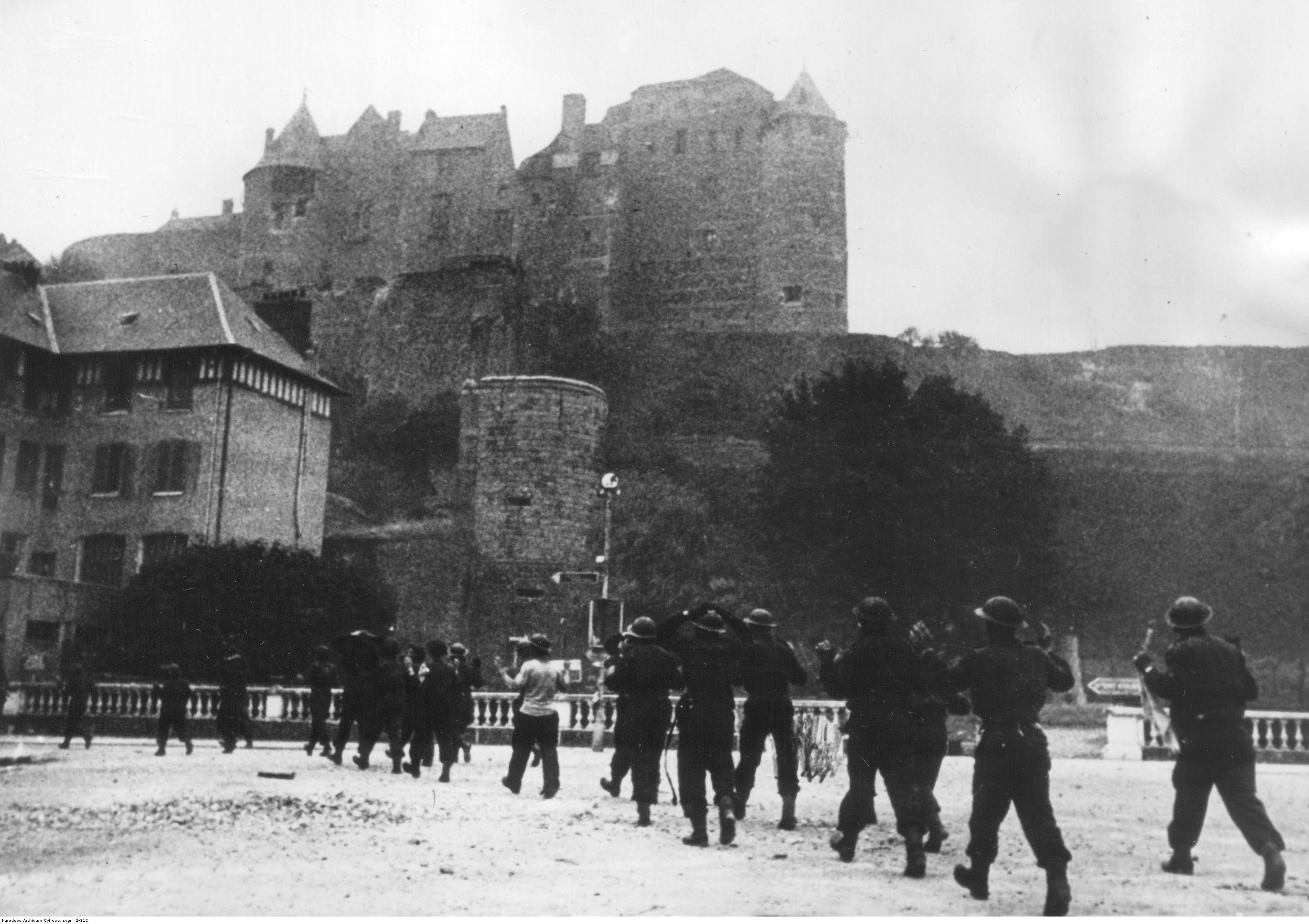 Żołnierze angielscy wzięci do niewoli po próbie zdobycia twierdzy Dieppe. W tle mury twierdzy.